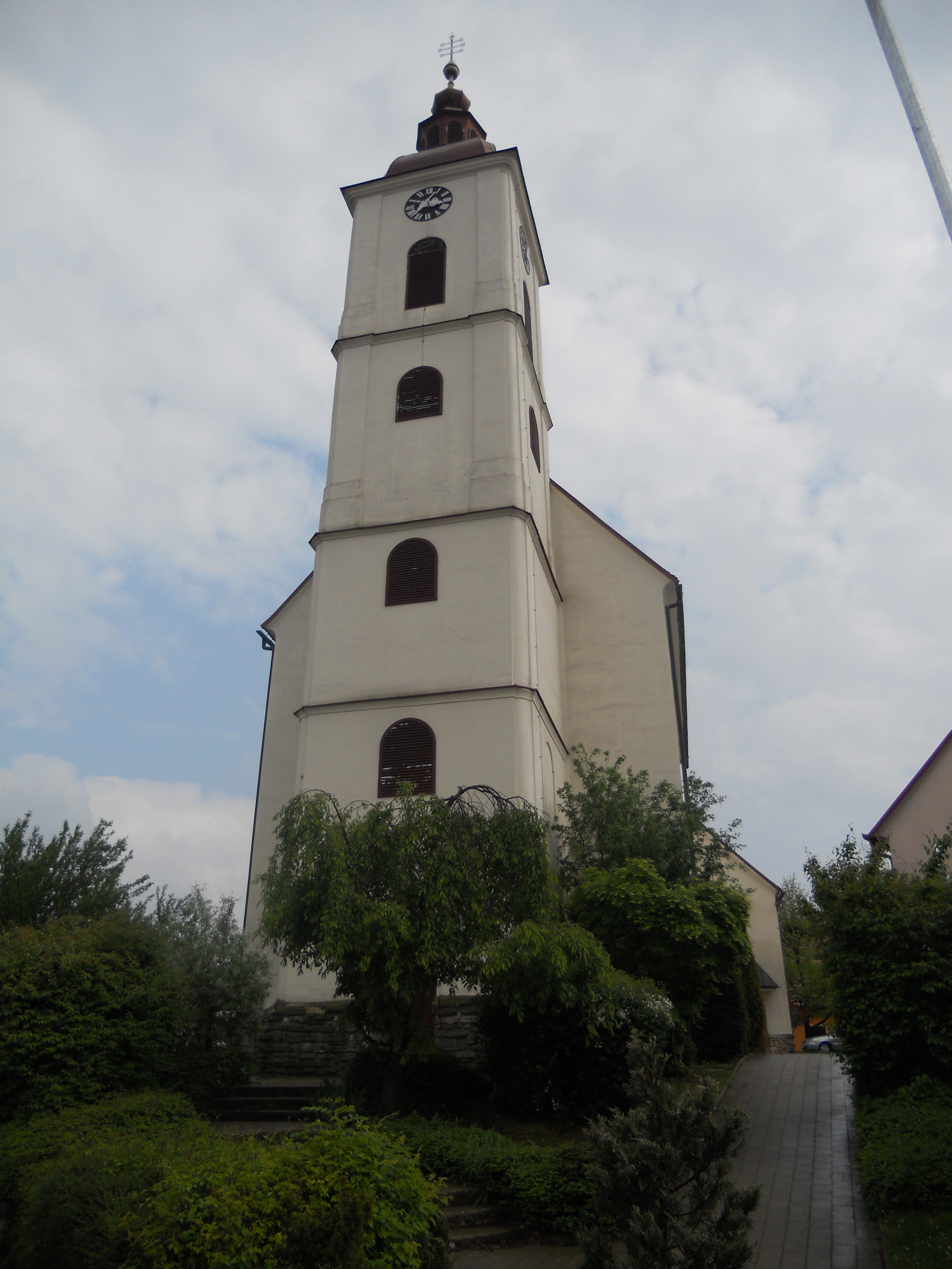 Pfarrkirche Sveta AnaSlovenščina: Cerkev Sveta Ana